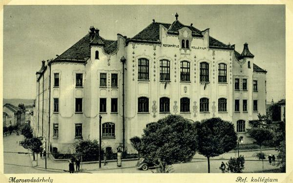 Bolyai Farkas Elméleti Líceum